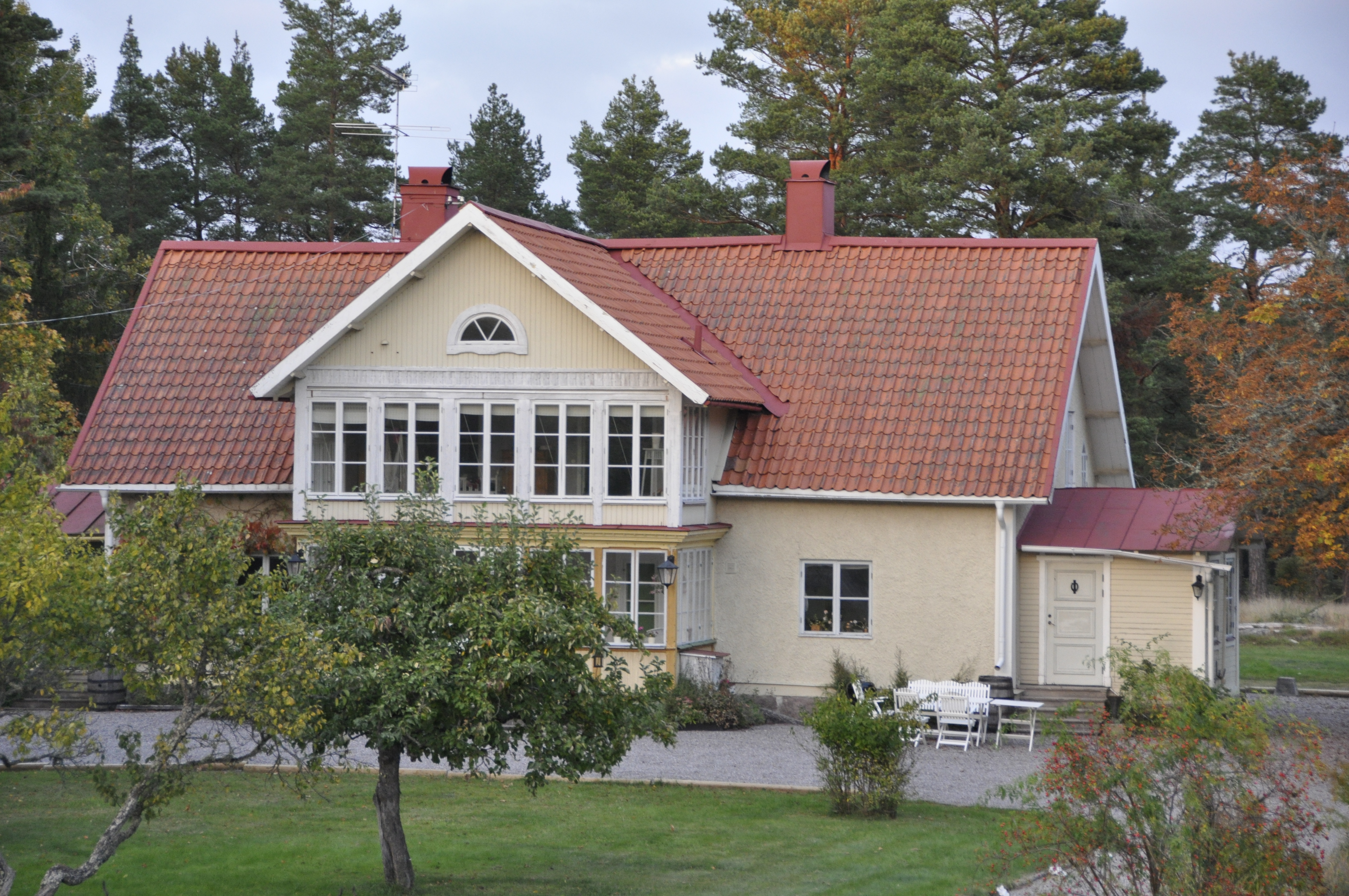 Manbyggnaden på Kårboda gård